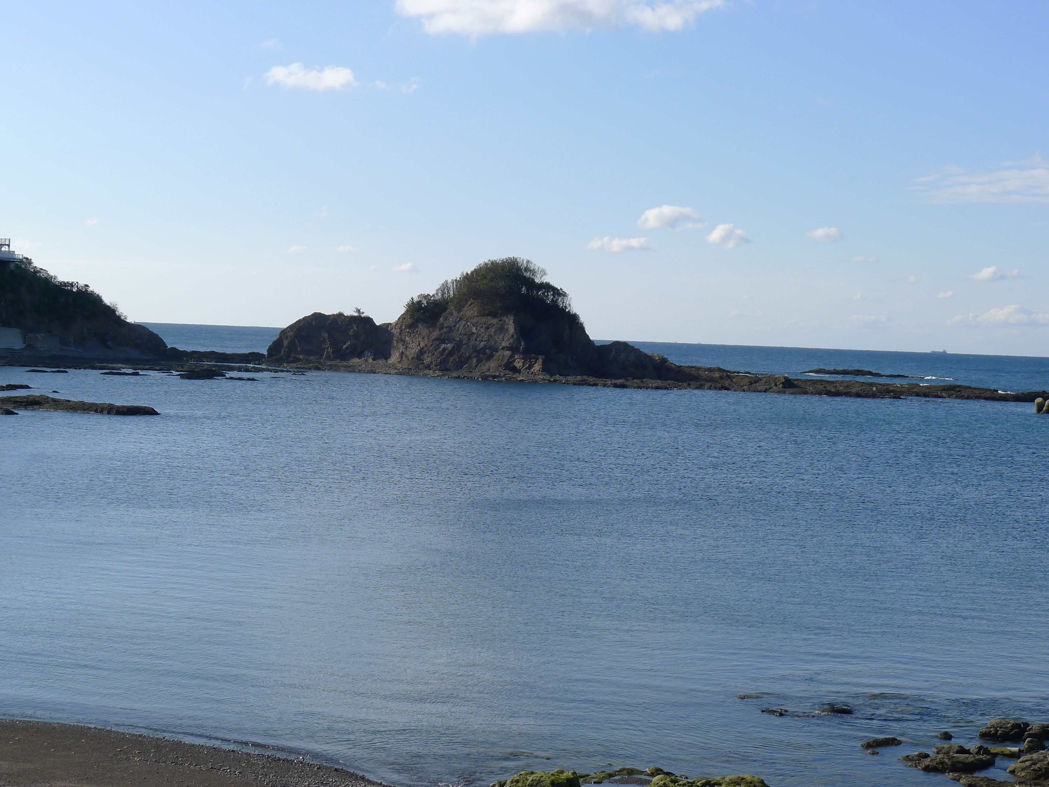 和歌山県印南市の光川海岸